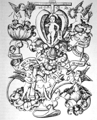 Christkind im Herzen (L. 51), "wer ihs (Jesus) in sinem herzen tre(g)t dem ist alle zit die ewige froed beraeit"